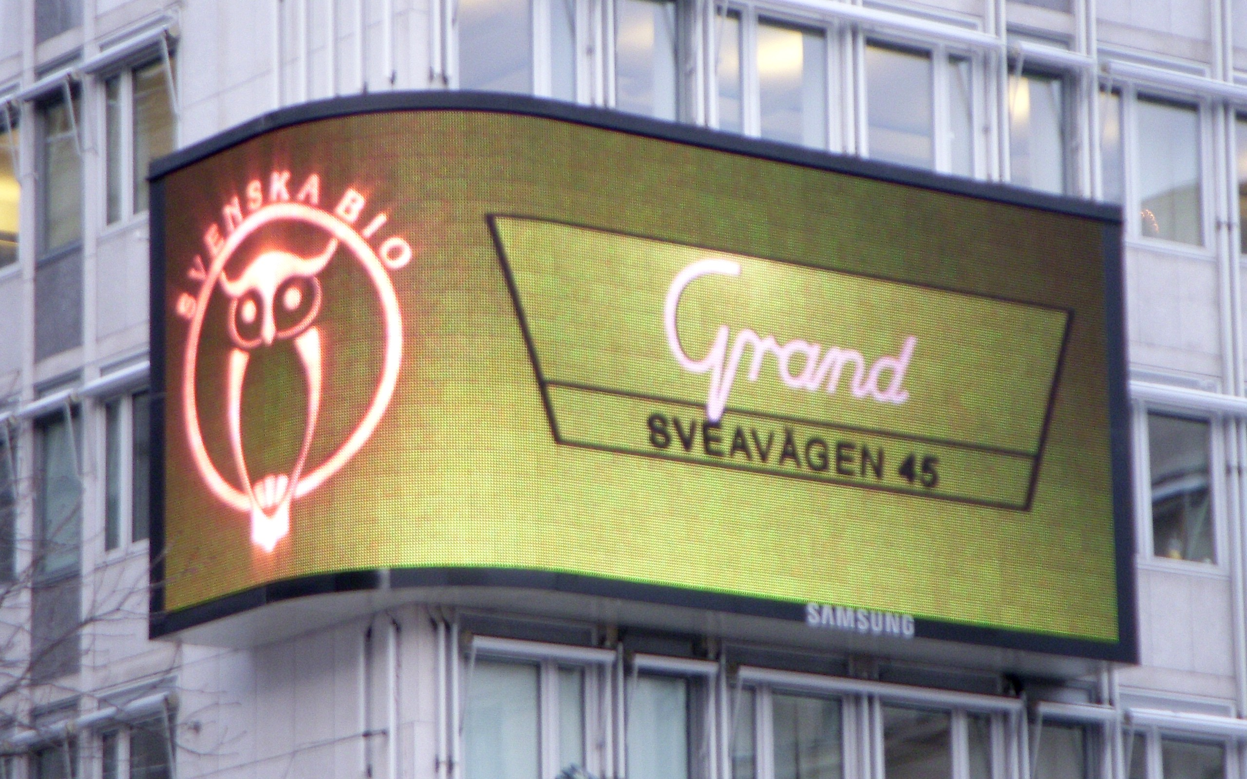 Ljusreklam vid Stureplan i Stockholm (Svenska Bio)